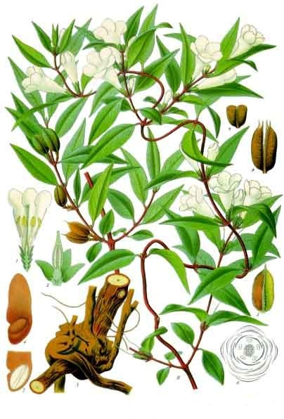 Carolina-Jasmin. A Wurzelstock. B Blütenzweig. C fruchttragender Zweig. 1 Blüte im Längsschnitt; 2 Fruchtknoten im Längsschnitt; 3 Frucht; 4 Frucht, querdurchschnitten; 5 Fruchthälfte, von innen gesehen; 6 Same; 7 Unterer Teil des Samens im Längsschnitt; 8 Diagramm. A, B, C, 1 natürliche Grösse, 2 bis 5 in doppelter Grösse, 6 bis 8 stärker vergrössert.